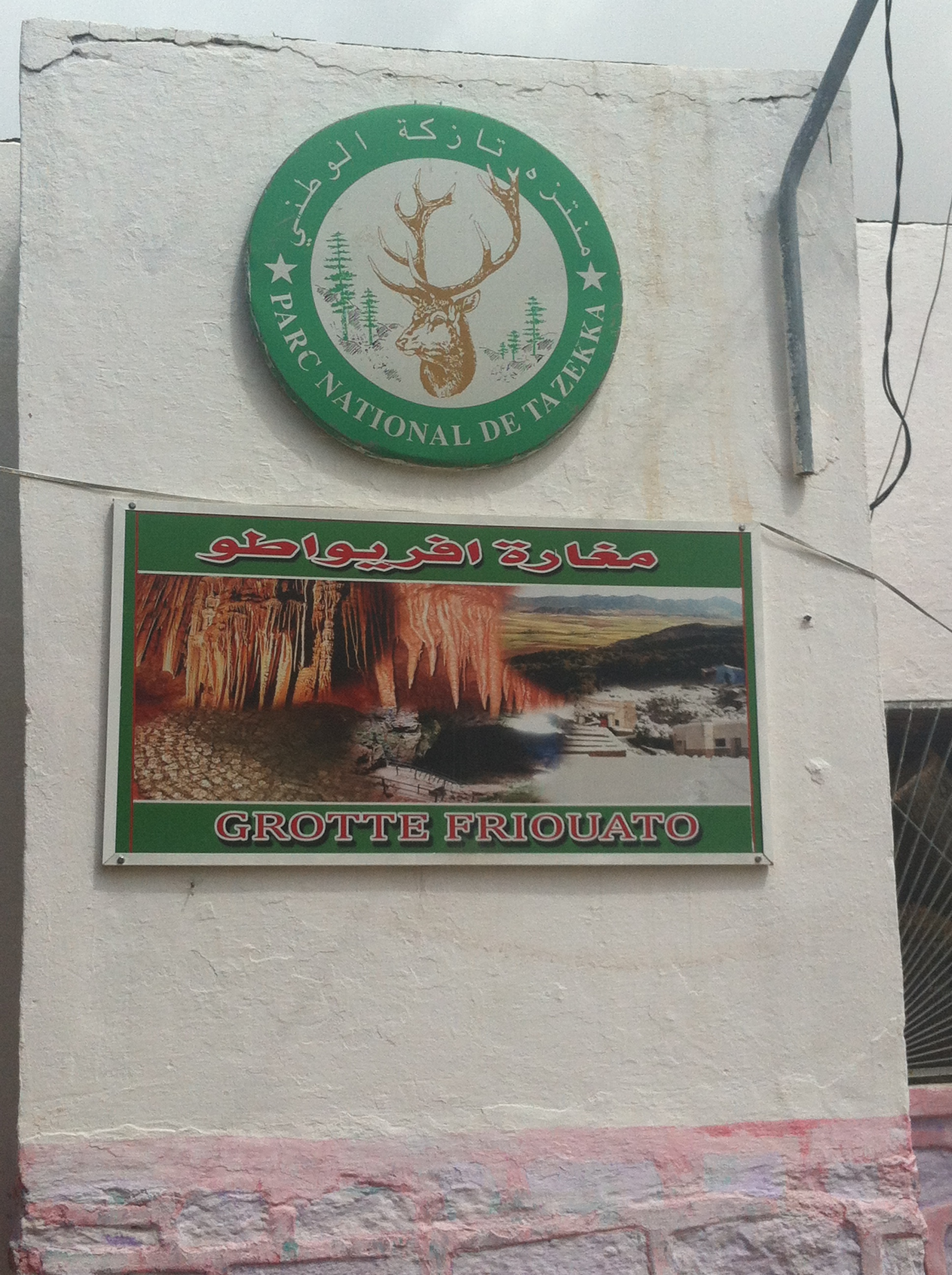 L'entrée de la Groute Friouatou